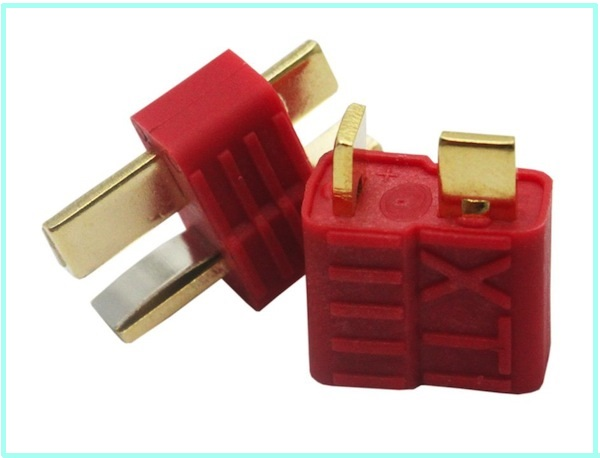 Т-коннектор для силовых цепей с низким напряжением